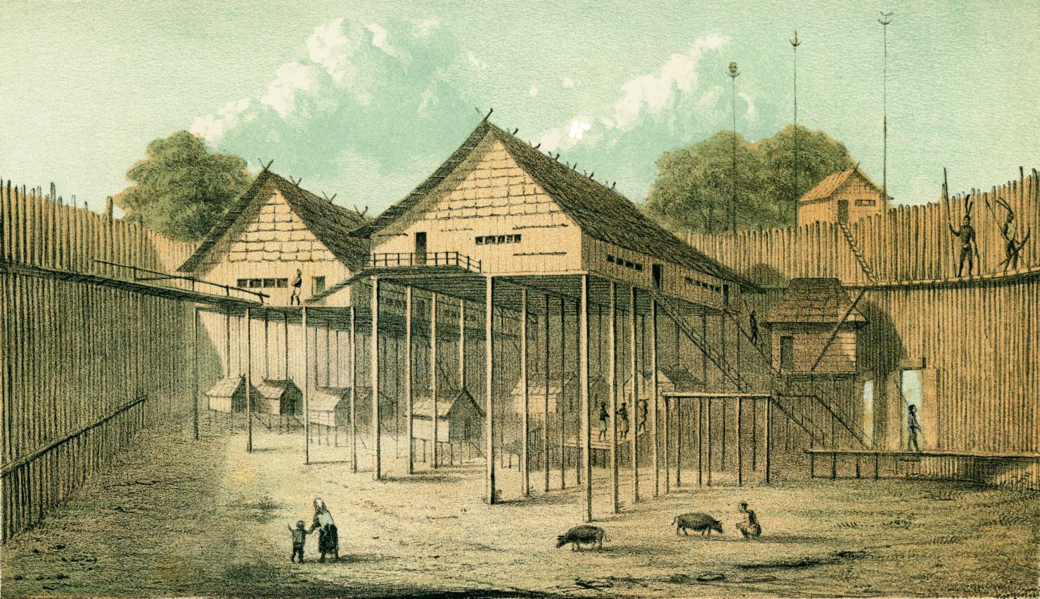 C.A.L.M. Schwaner, Borneo. Ein Dayakdorf, als Festung errichtet